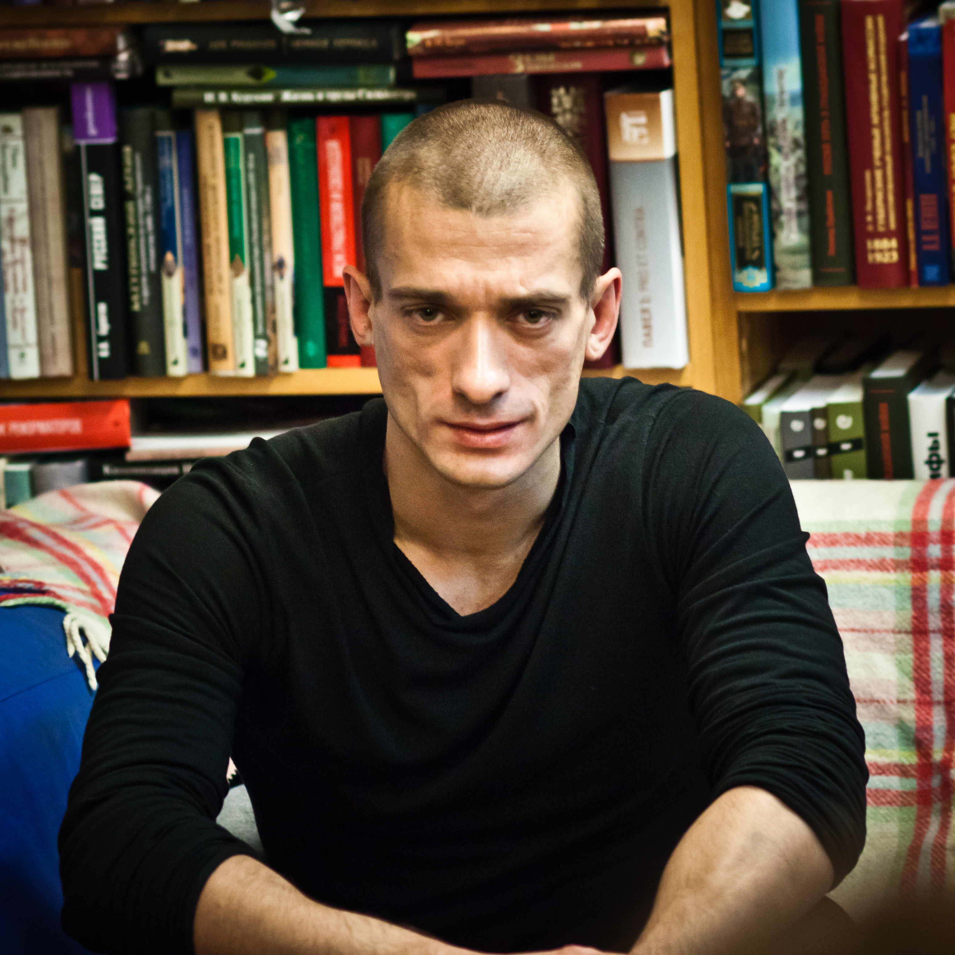 Художник Пётр Павленский на встрече с читателями в магазине "Циолковский"